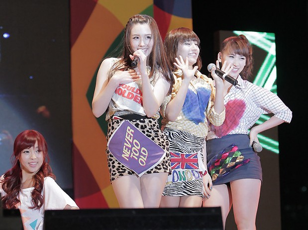 걸그룹 쇼콜라